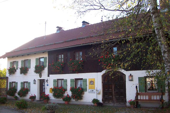 Anwesen mit Fuhr- und Posthalterei in Kerschlach